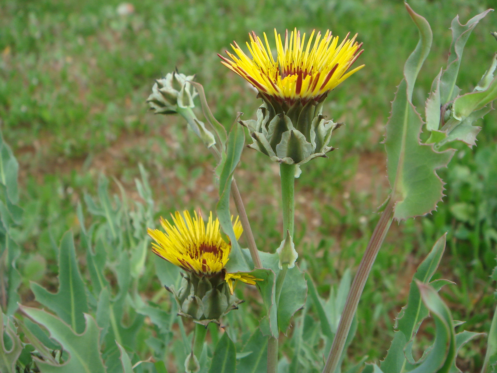 Reichardia gaditana, Pinar de La Barrosa, Chiclana (Cádiz), España